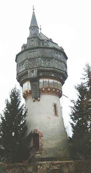 the water-tower of Eschersheim/Frankfurt/Main/Germany (de: Der alte Wasserturm in Eschersheim, Am Lindenbaum, gegenüber Nummer 93)